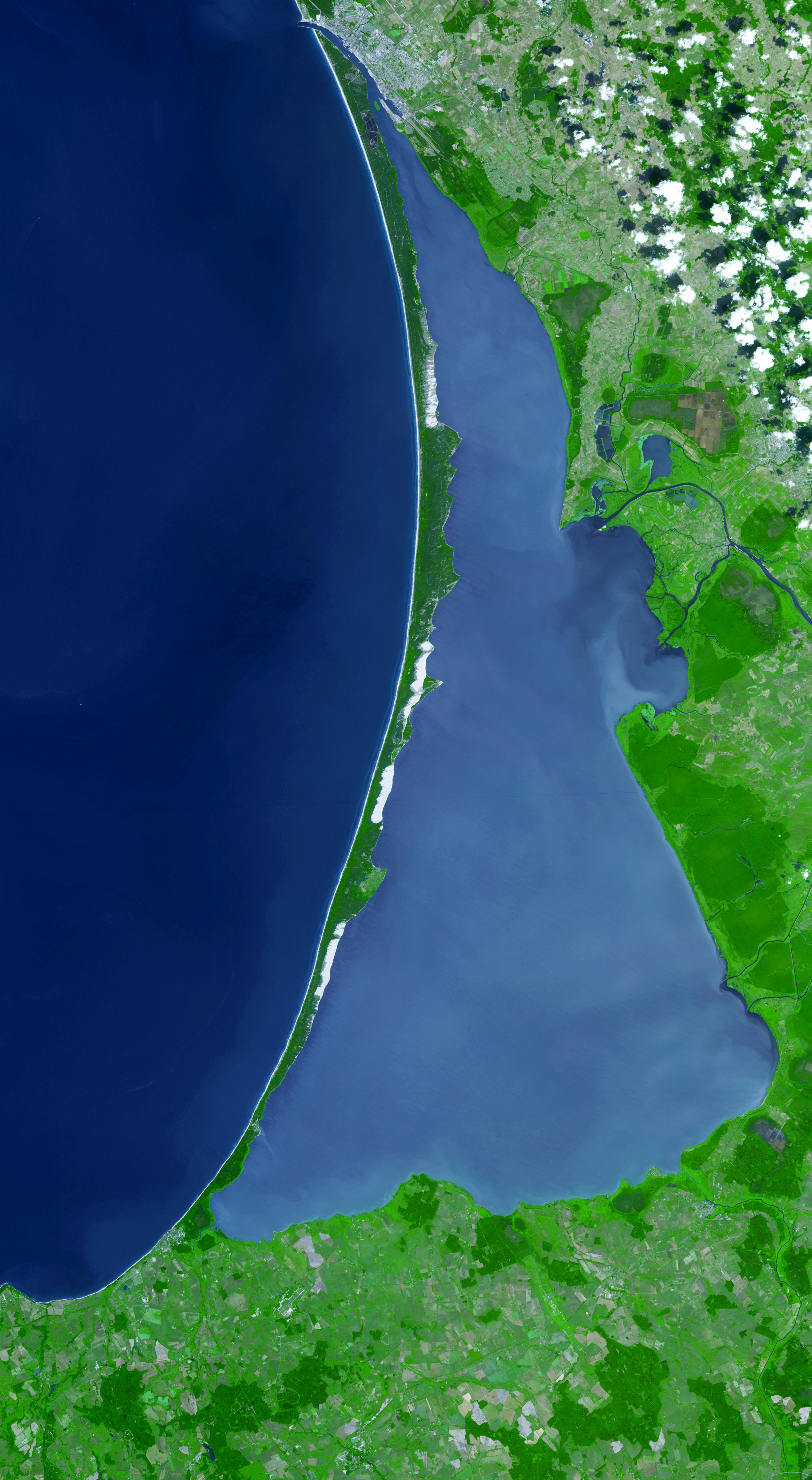 Curonian Spit, 2006